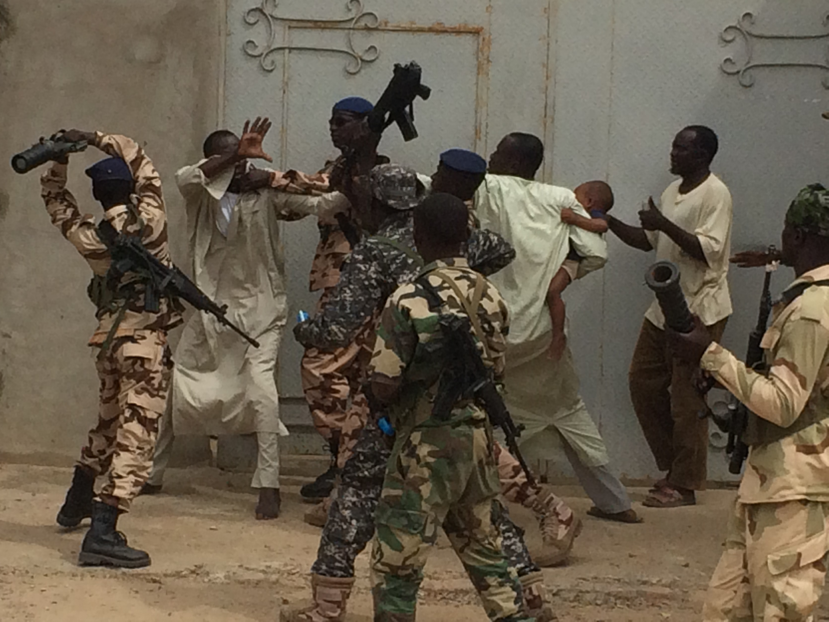 Manifestation dans la rue de N'Djamena lundi, au Tchad, le 22 janvier 2018. (VOA/André Kodmadjingar) Tous ces remous sociaux visent à soutenir la grève des transporteurs et la journée sans engin déclarée par la dynamique citoyenne pour la protection des droits du consommateur pour protester contre la hausse du prix de carburant à la pompe. La grève coïncide avec celle des enseignants des deux grands lycées pour dénoncer la violation de leurs locaux par la police lors de la manifestation des étudiants le 17 janvier dernier.